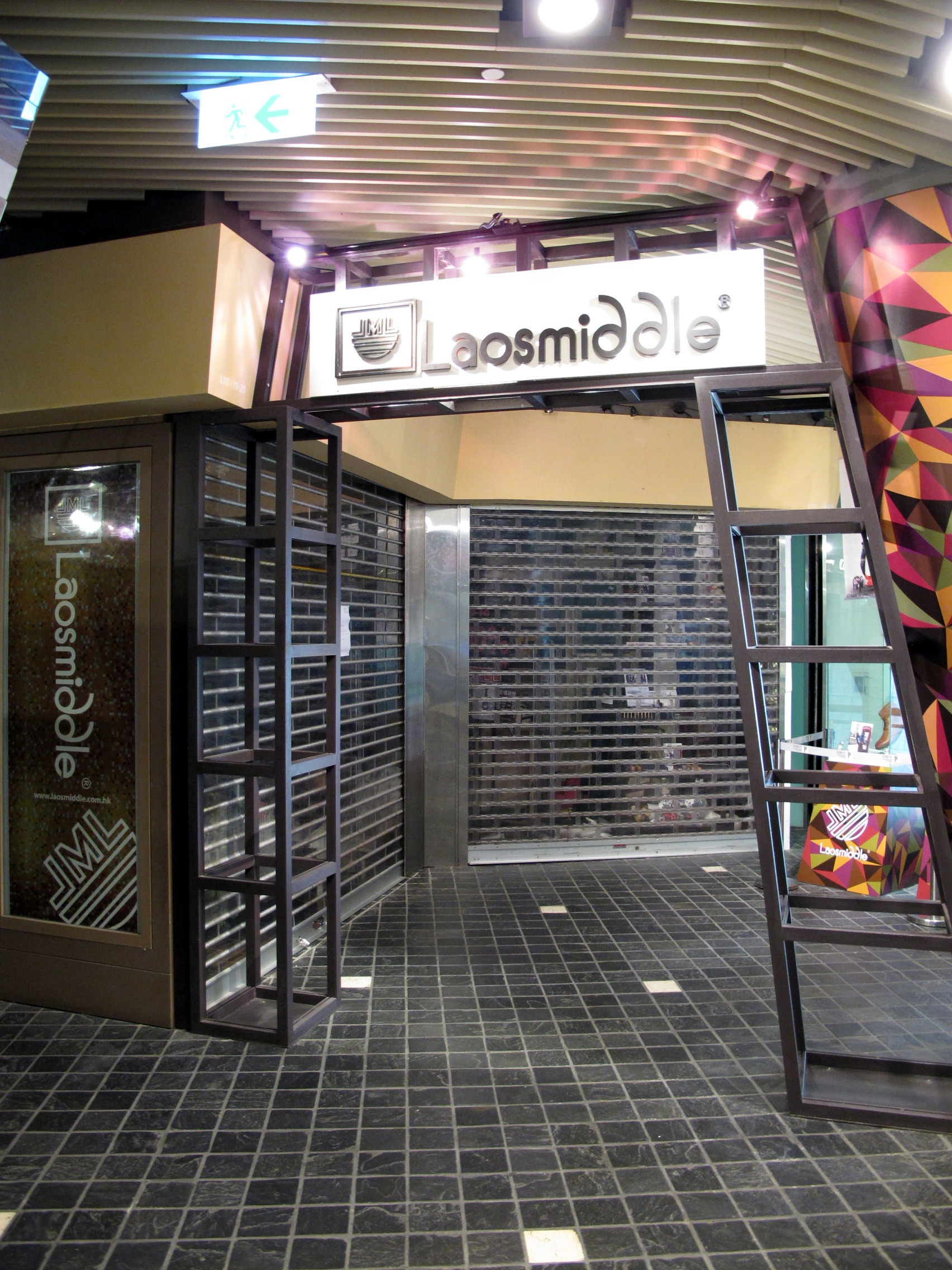 Langham Place Laosmiddle